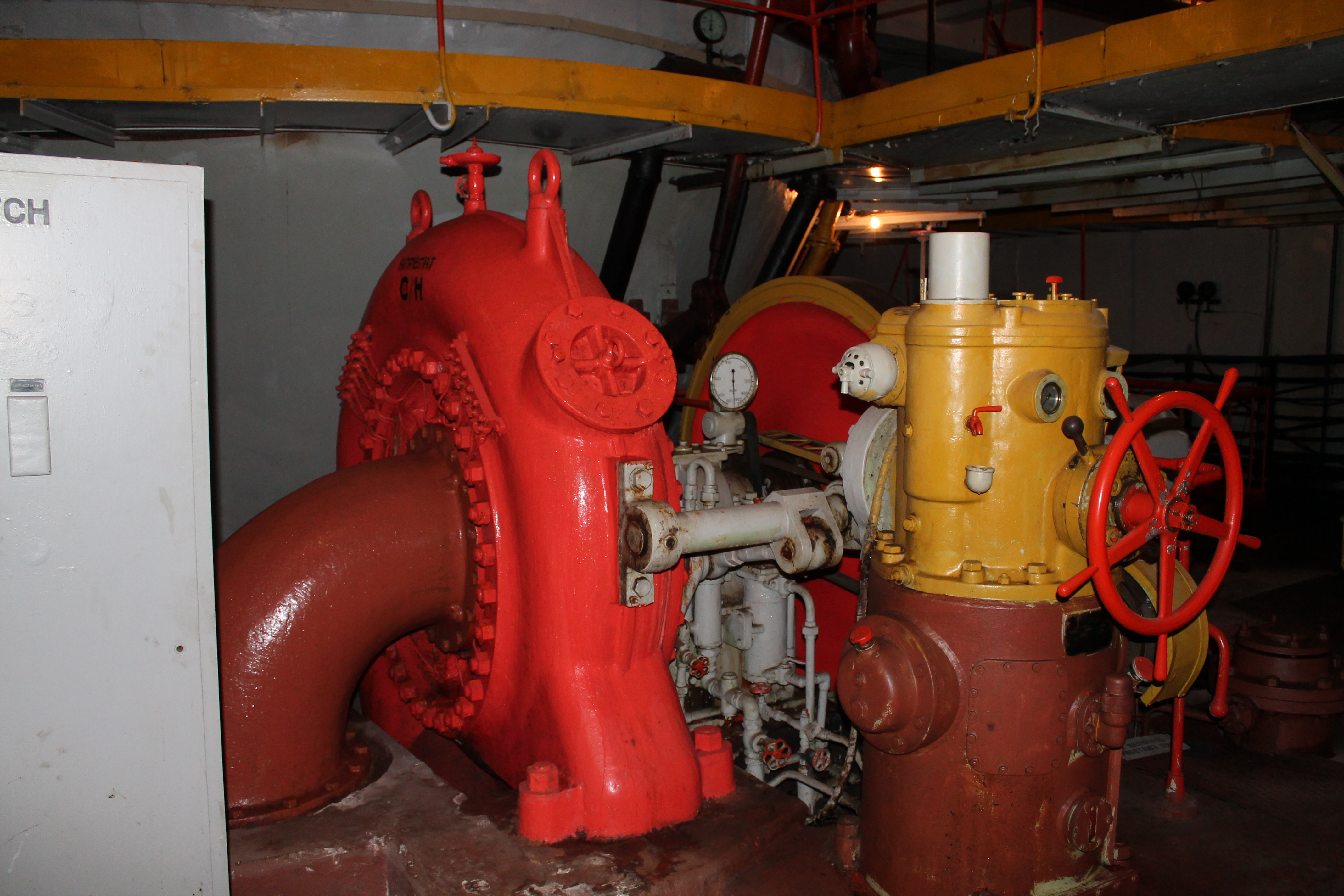 Гидроагрегат собственных нужд Севанской ГЭС